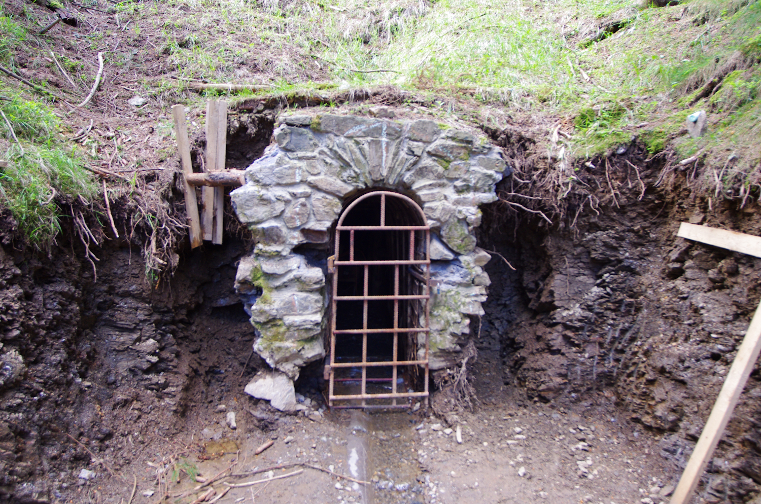 Zlatý Kopec, Krušné hory, štola Johannes